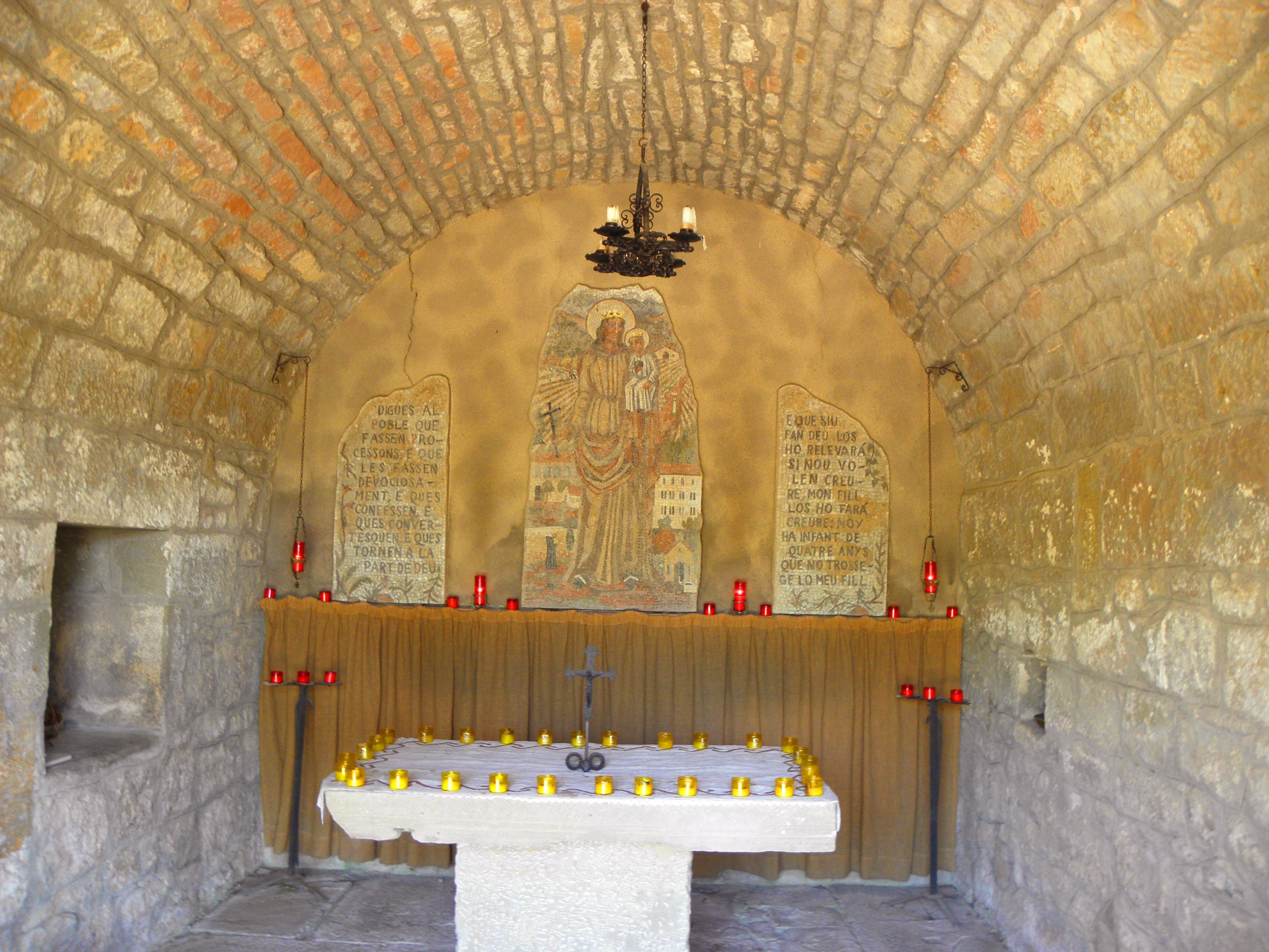 L'nterior de la capella de la Desaparició, al Santuari del Miracle (Riner, Solsonès)